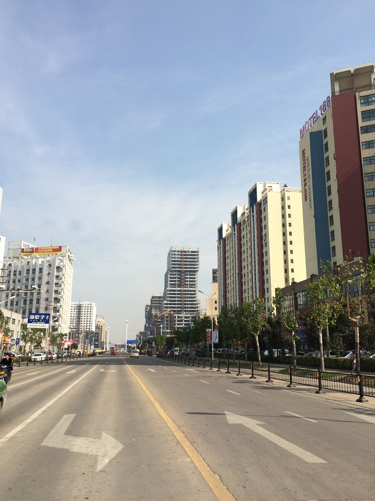 宿迁市人民大道和西湖路交叉口，向西看西湖路